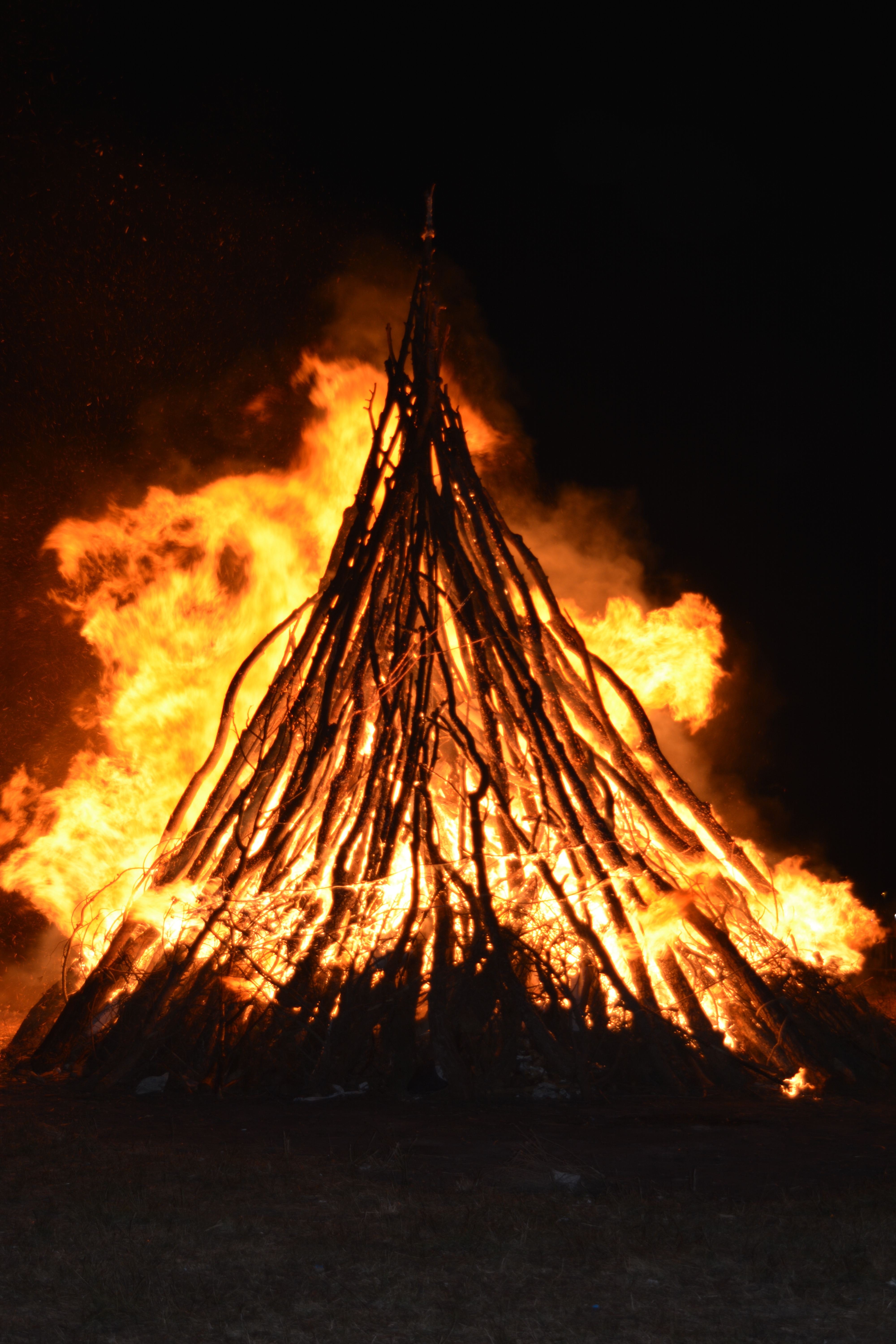 Hoguera de San Juan se celebra la noche del 23 de Junio en la barriada Juan Yagüe, tiene una tradición de más de cincuenta años.